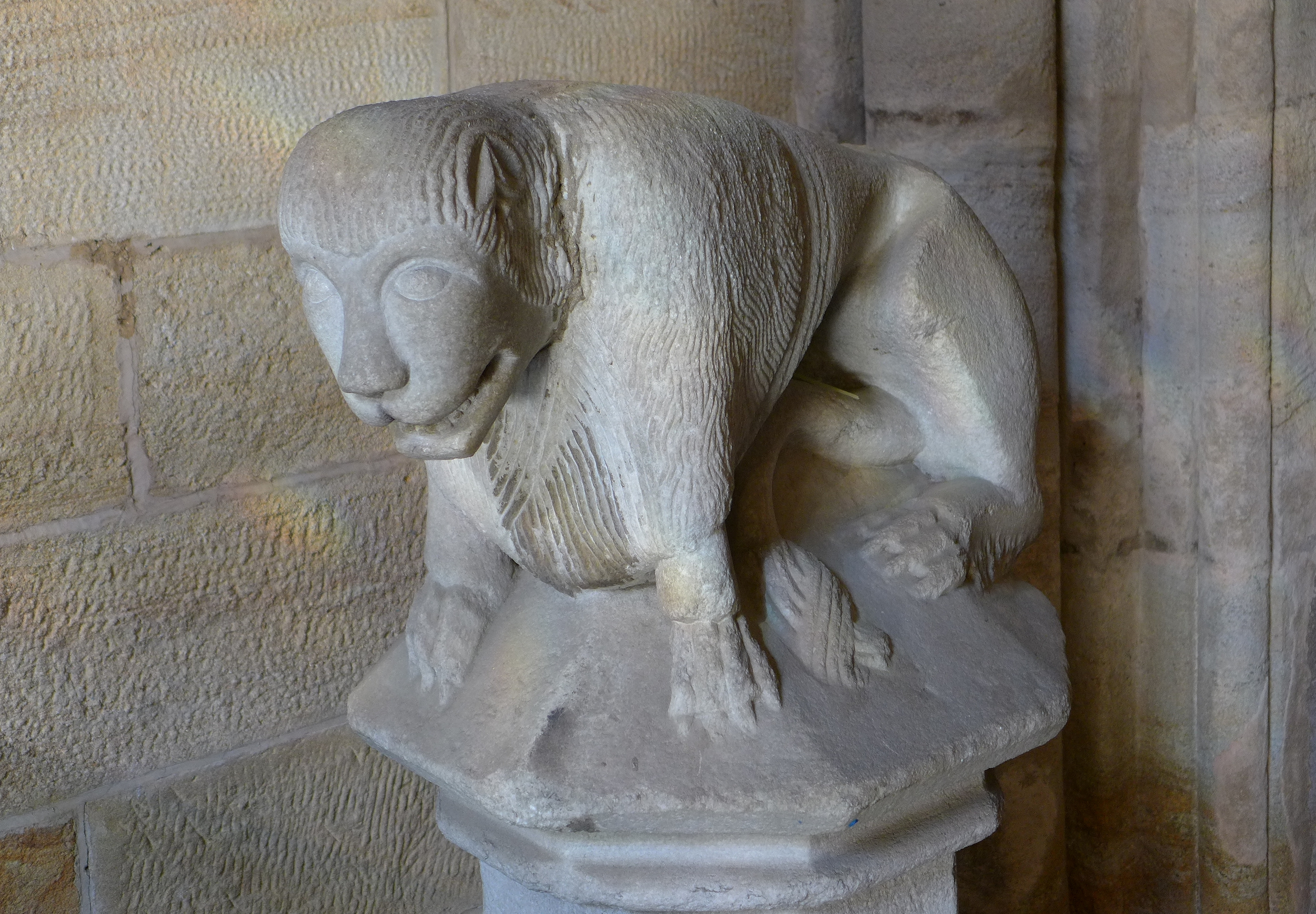 Basilika Seckau, Vorhalle, Romanischer Löwe